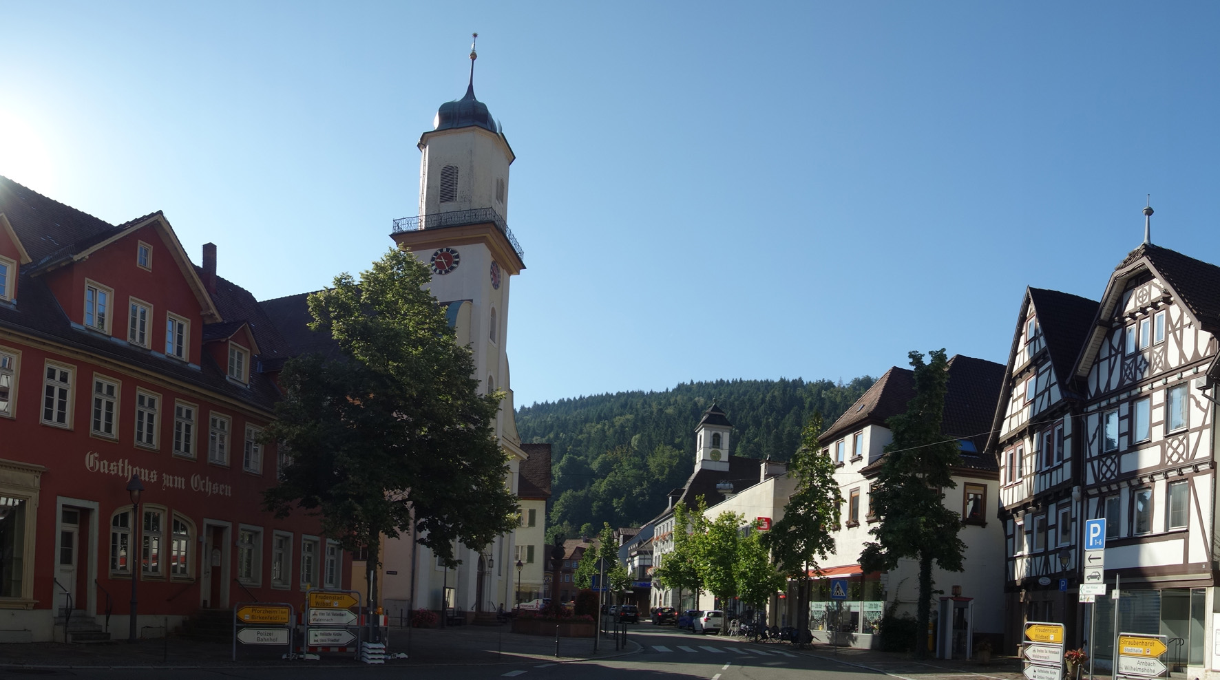 Marktplatz Neuenbürg